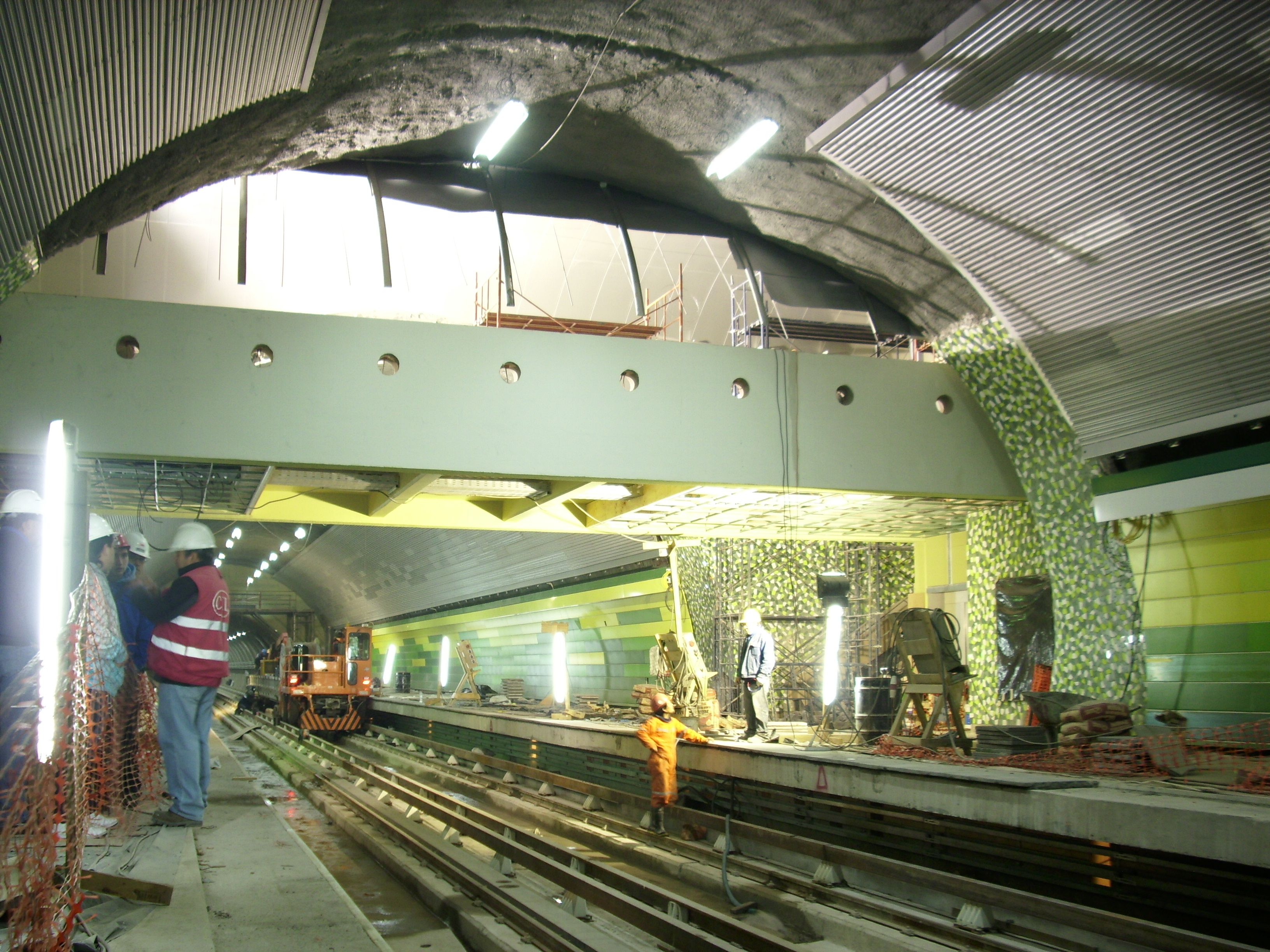 El andén de la estación Santiago Bueras durante su construcción, el 10 de julio de 2010. Línea 5 del Metro de Santiago. Maipú, Chile.